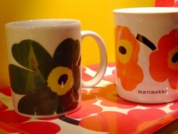 A kép a Néprajzi Múzeum "(M)ilyenek a finnek" című kiállításán készült.